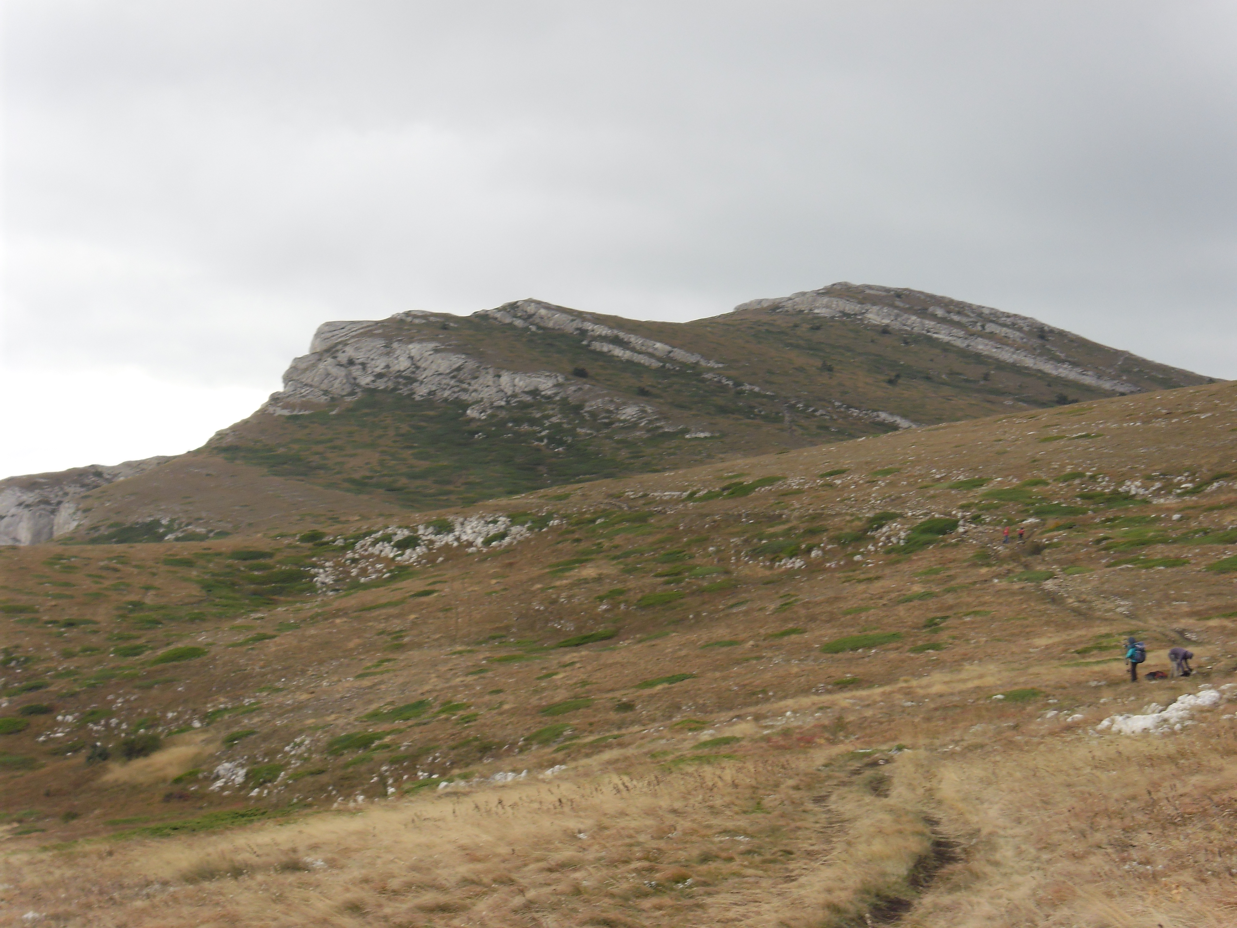 Фото